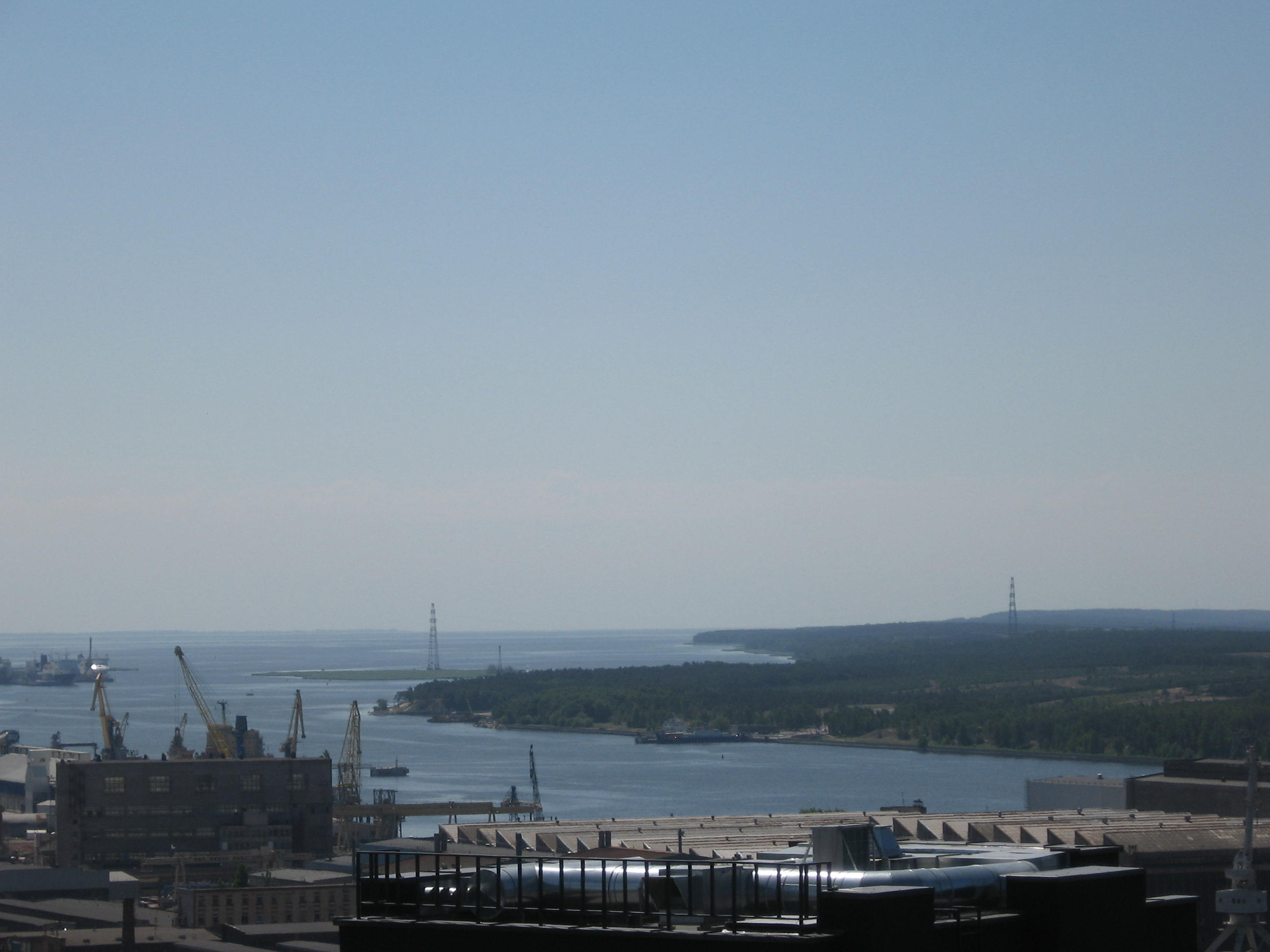 Kiaulės Nugaros sala